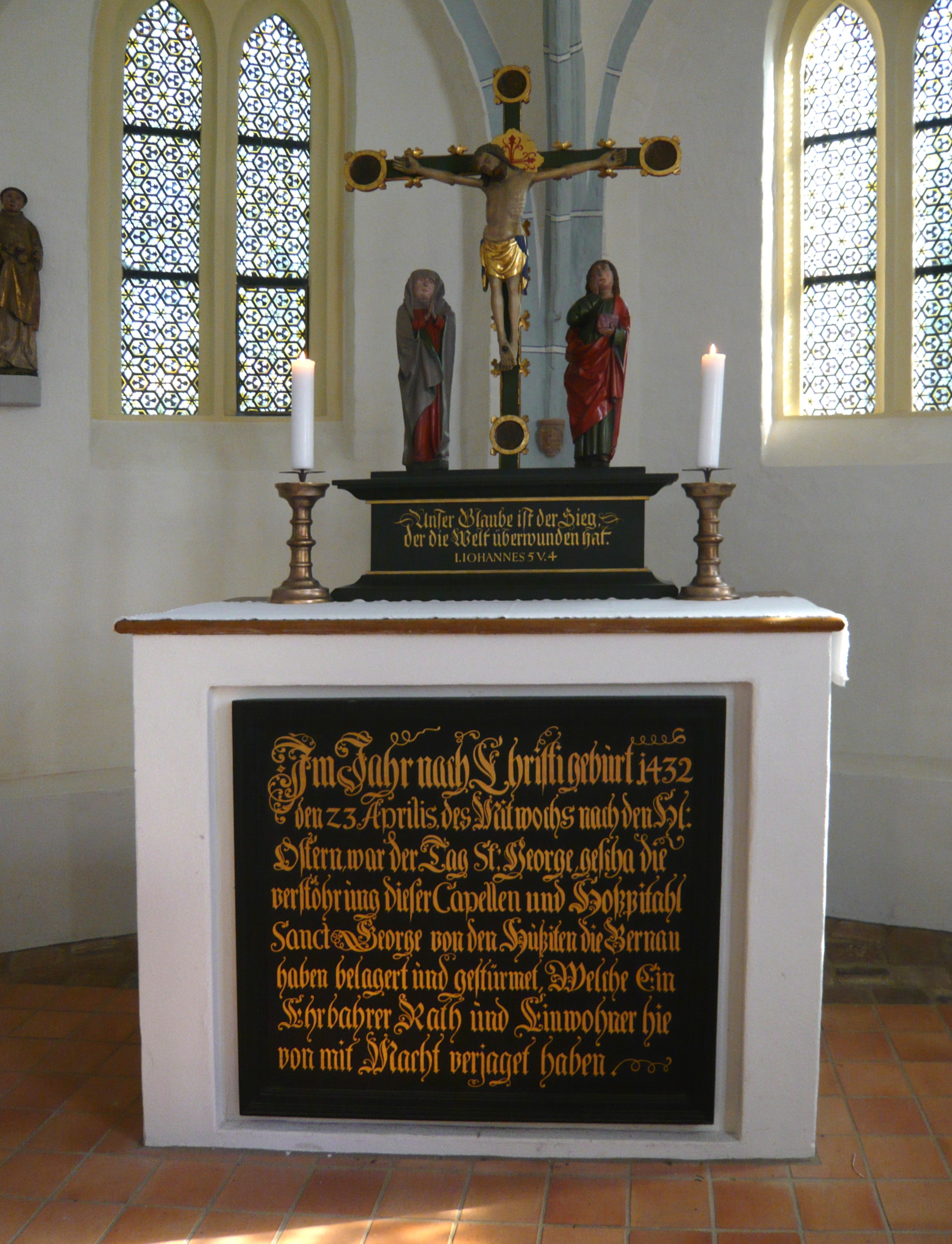 Bernau bei Berlin, St.-Georgen Hospital: Altarnische in der Kapelle